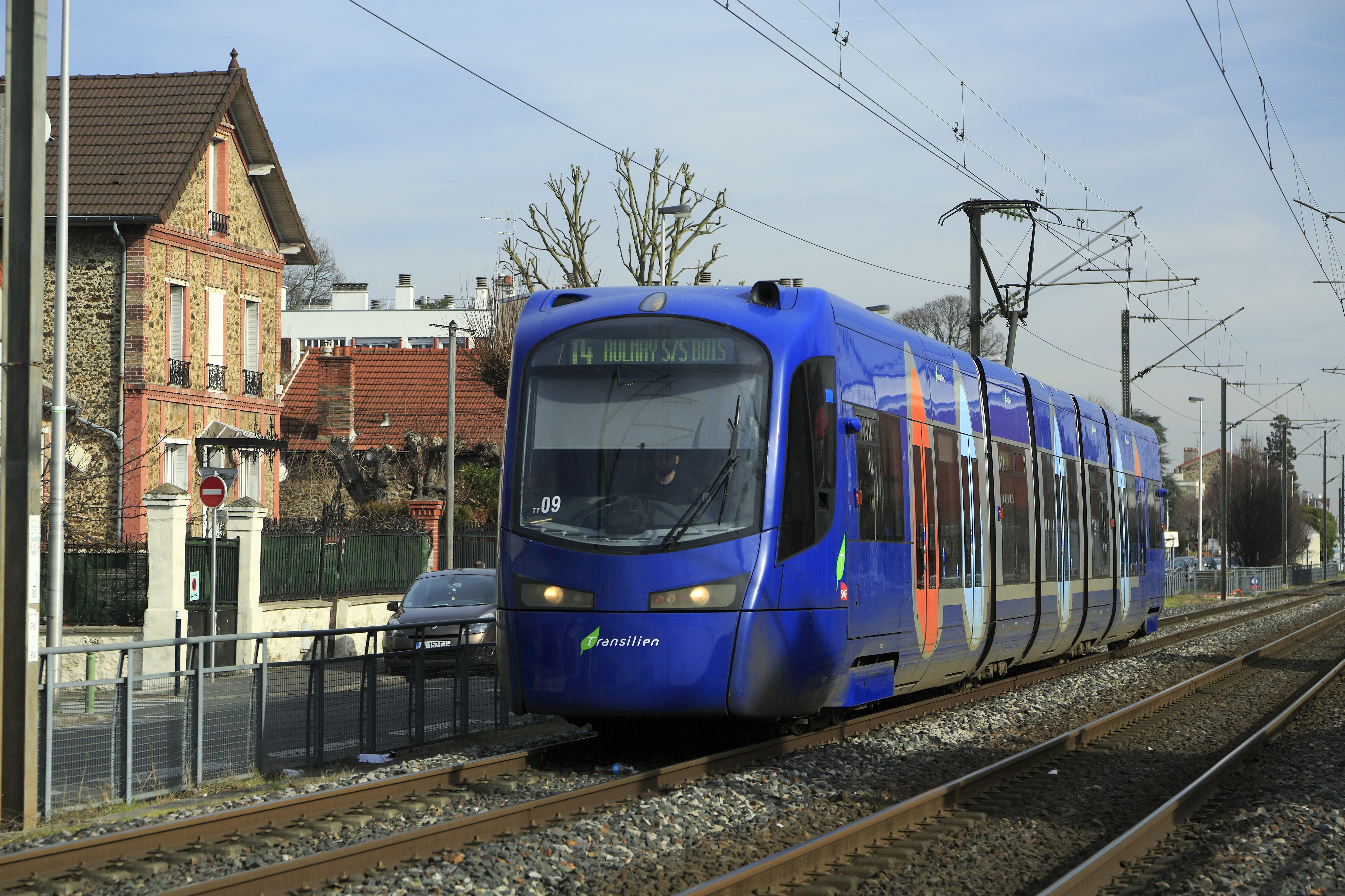 Zug der Linie T4 Aulnay-sous-Bois–Bondy zwischen den Haltepunkten Allée de la Tour-Rendez-Vous und Les Coquetiers. Die bisher betriebene Strecke war vor dem Umbau auf Straßenbahnbetrieb Teil des Fernbahnnetzes, das ist noch deutlich zu sehen. Streckenabschnitte im Straßenraum gibt es bisher nicht. Die Triebwagen der SNCF-Reihe U25500 sind jedoch schon für die im Bau befindliche Zweigstrecke nach Montfermeil zweisystemfähig ausgelegt. Diese Zweigstrecke soll wegen der Führung durch Stadtstraßen mit 750V Gleichspannung betrieben werden.